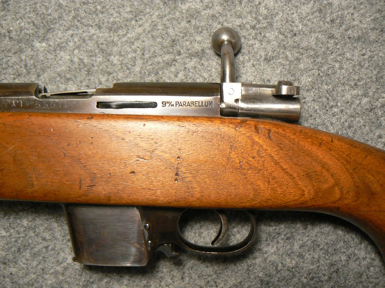 Grabado indicativo de calibre.